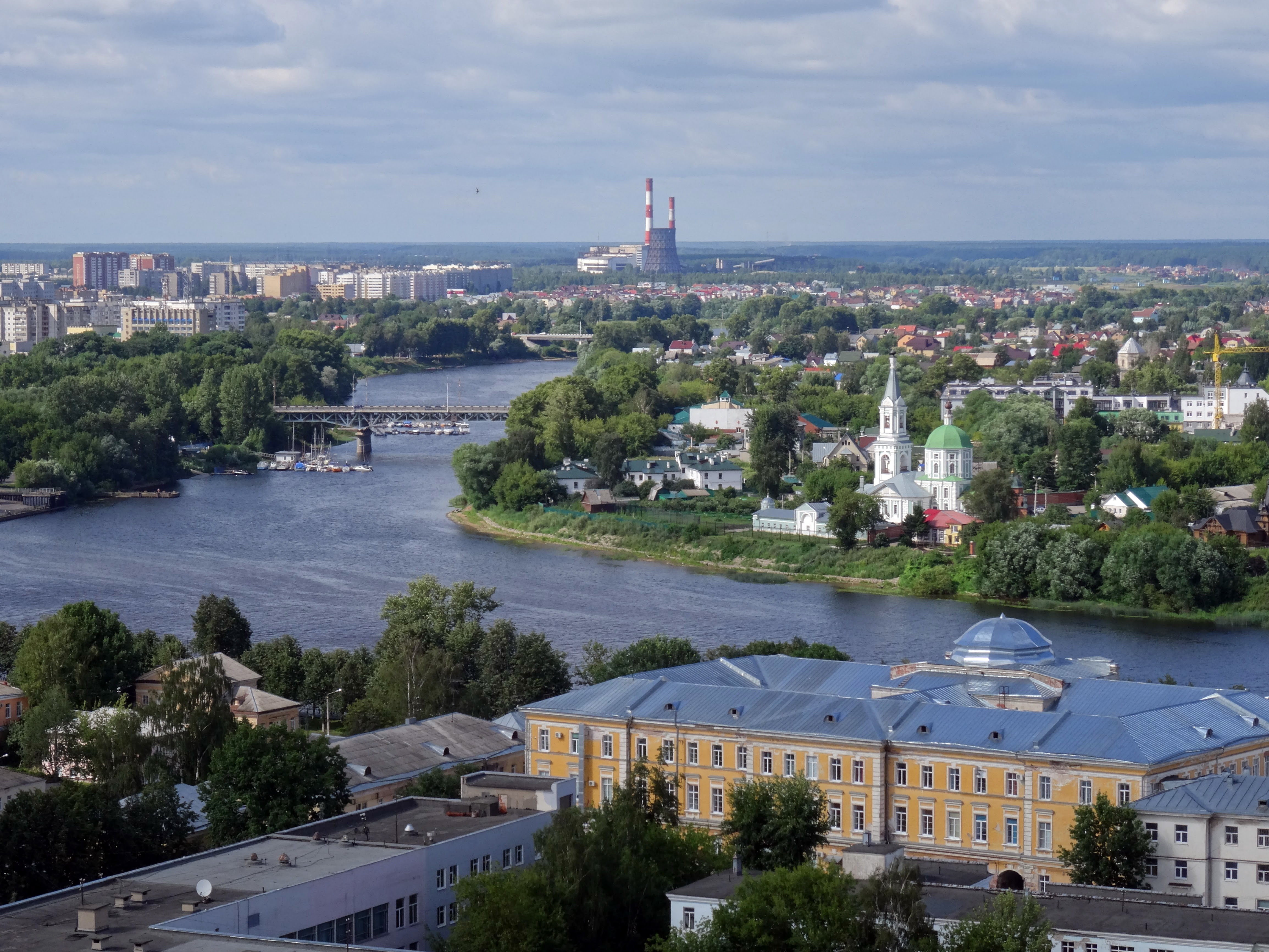 Церковь: улица Кропоткина, 47, Тверь, Тверская область